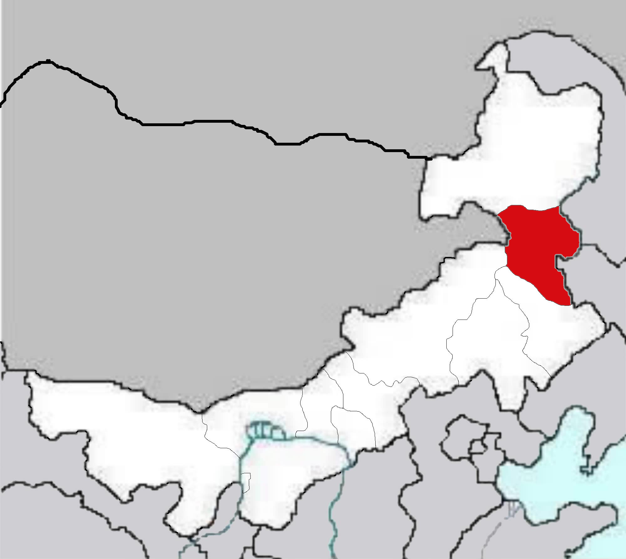 Inner Mogolia Maps